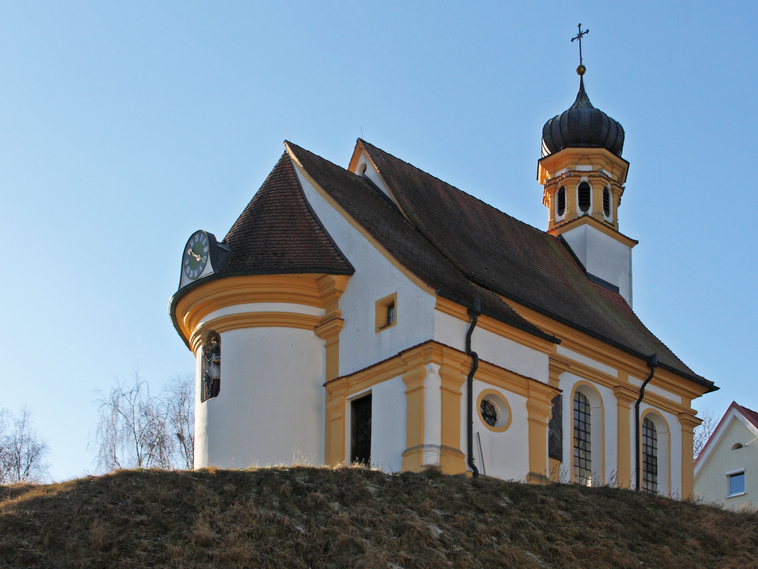 Filialkirche St. Ulrich und Vitus in Seifertshofen; Nordostansicht